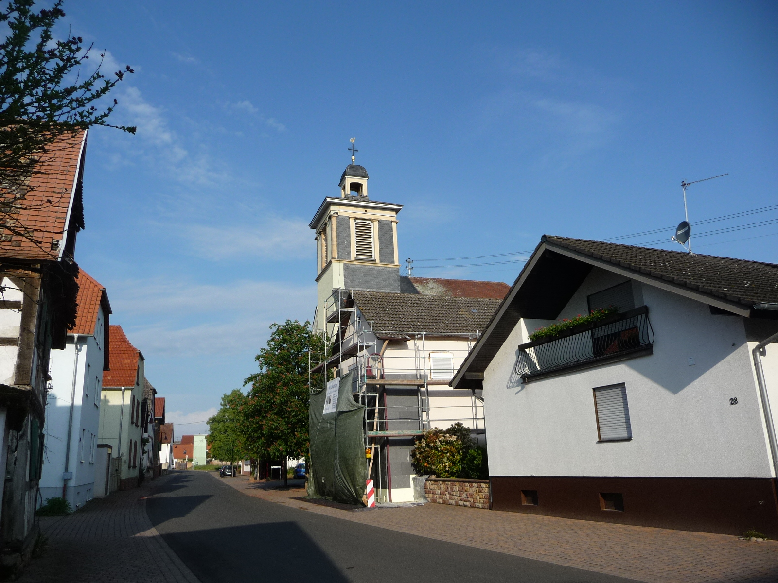 Böbingen ist eine Gemeinde im Landkreis Südliche Weinstraße, Rheinland-Pfalz.